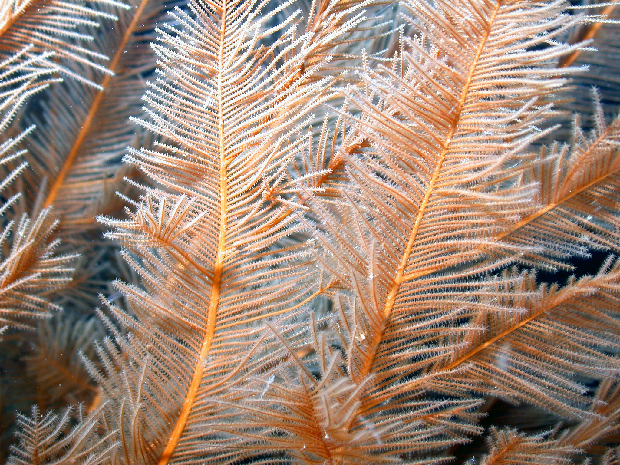 Plumapathes